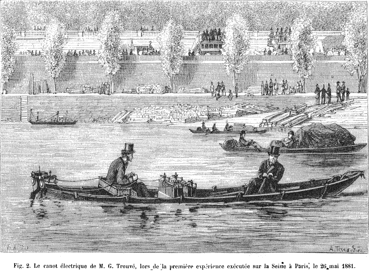 Premier hors-bord électrique de Gustave Trouvé